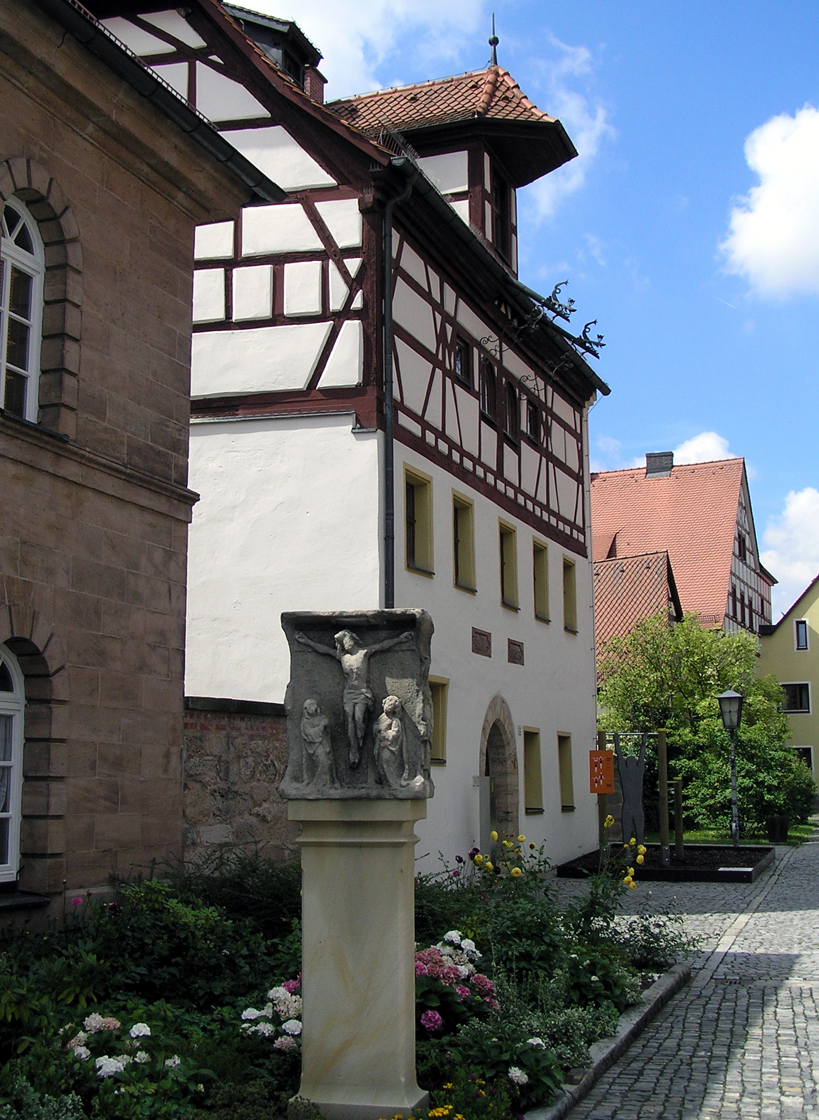 Das Stadtmuseum in Herzogenaurach, gegenüber der Pfarrkirche